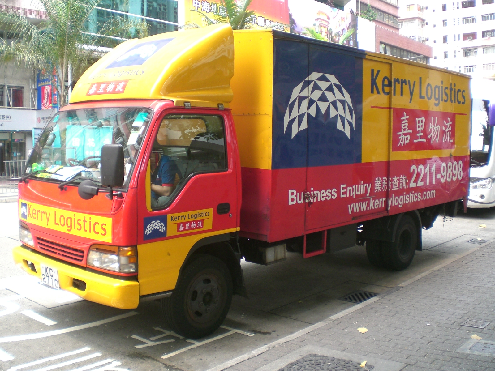 中文（香港）: 嘉里物流貨車於香港灣仔軒尼詩道近修頓中心